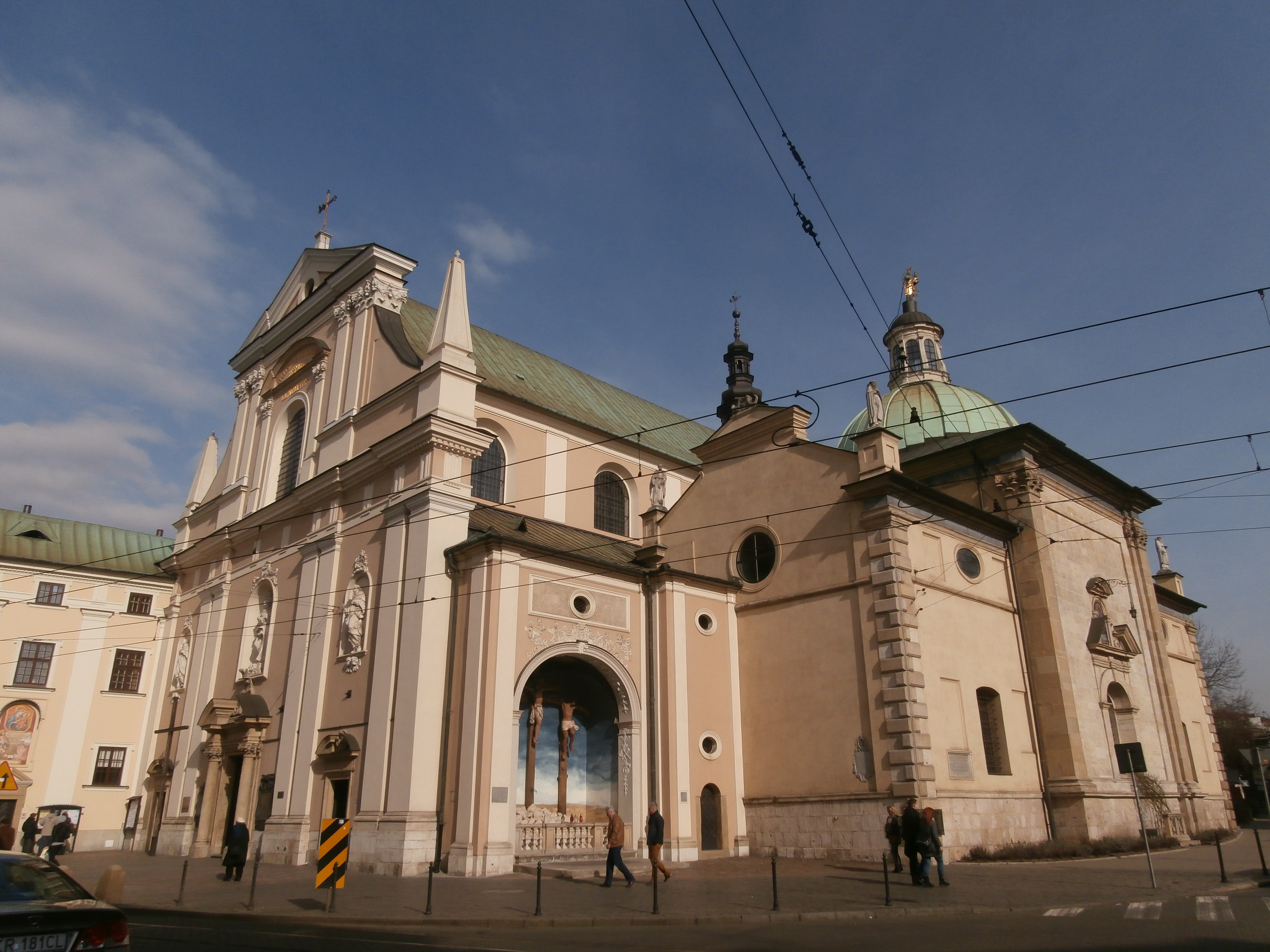 Bryła Kościoła Nawiedzenia Najświętszej Maryi Panny (Karmelitów na Piasku) w Krakowie na ul. Karmelickiej.